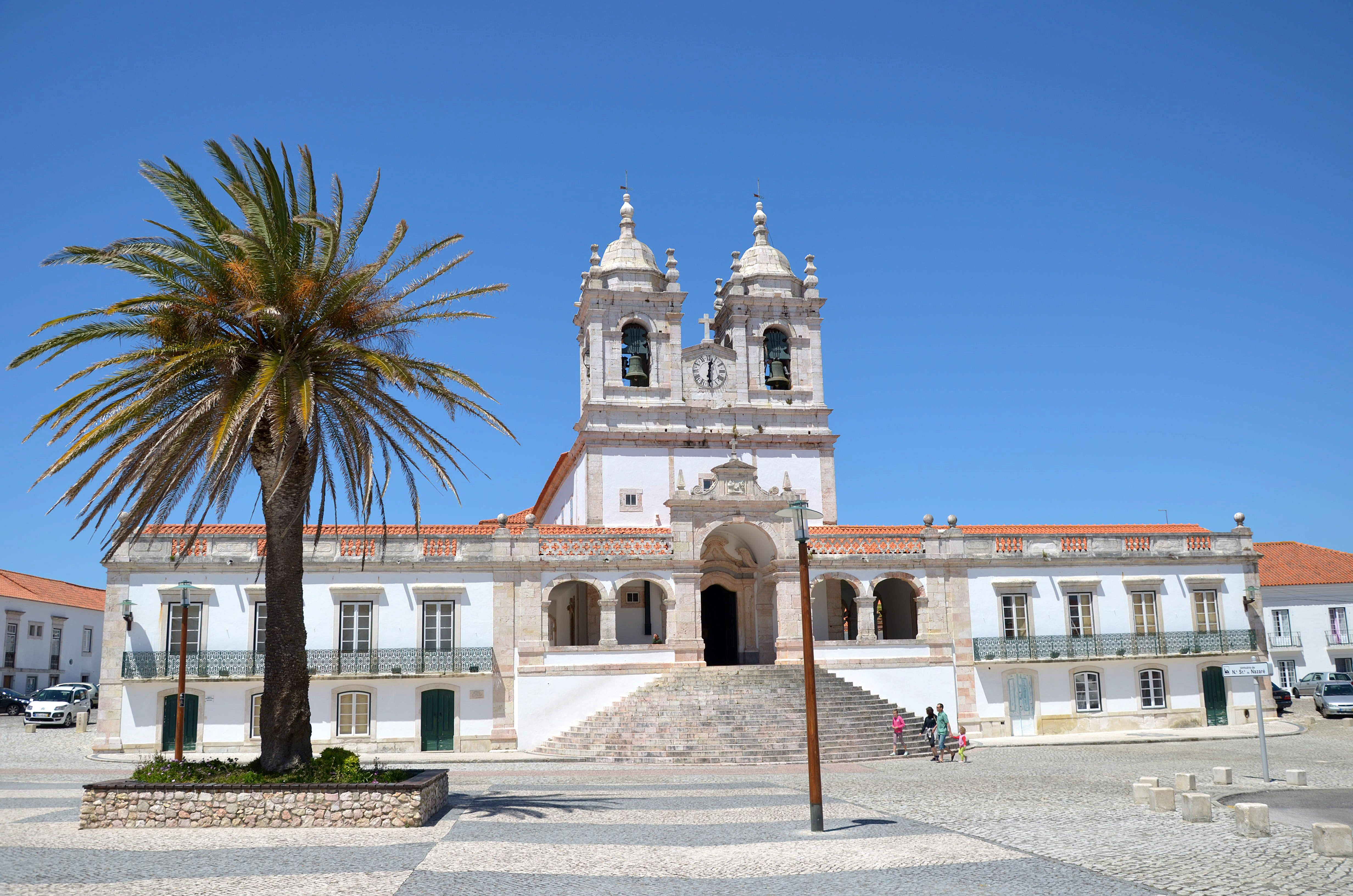 2450 Nazaré, Portugal